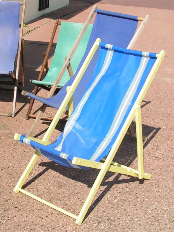 deckchairs